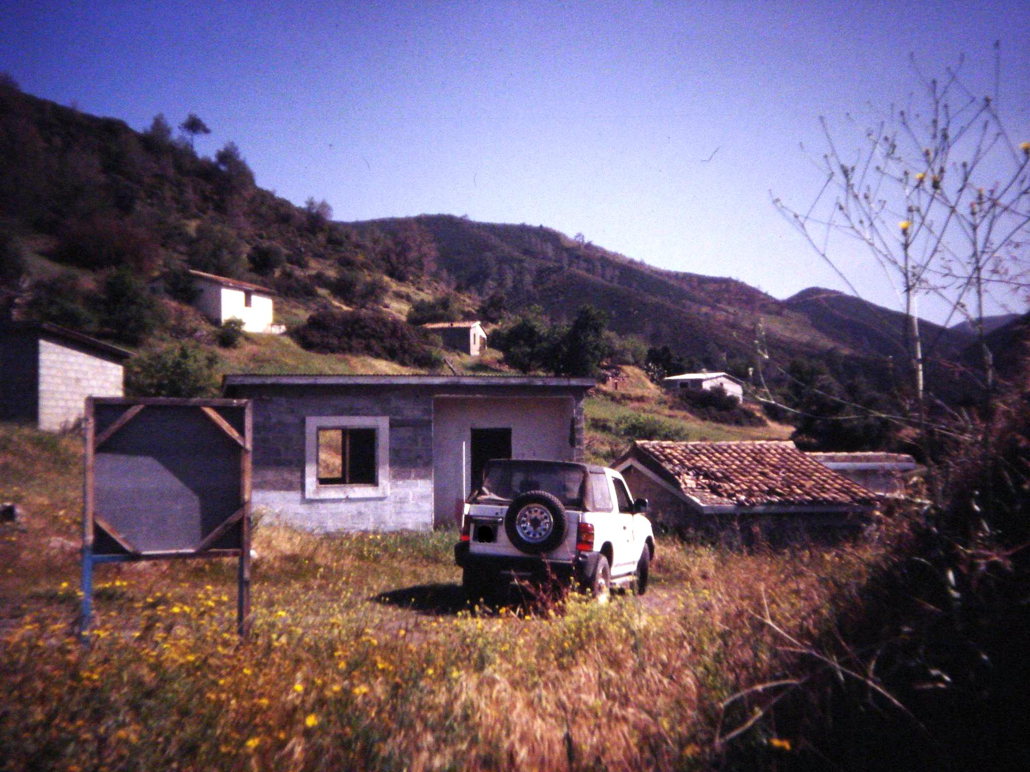 Selemani